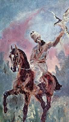 正在獵鷹的羅特列克伯爵